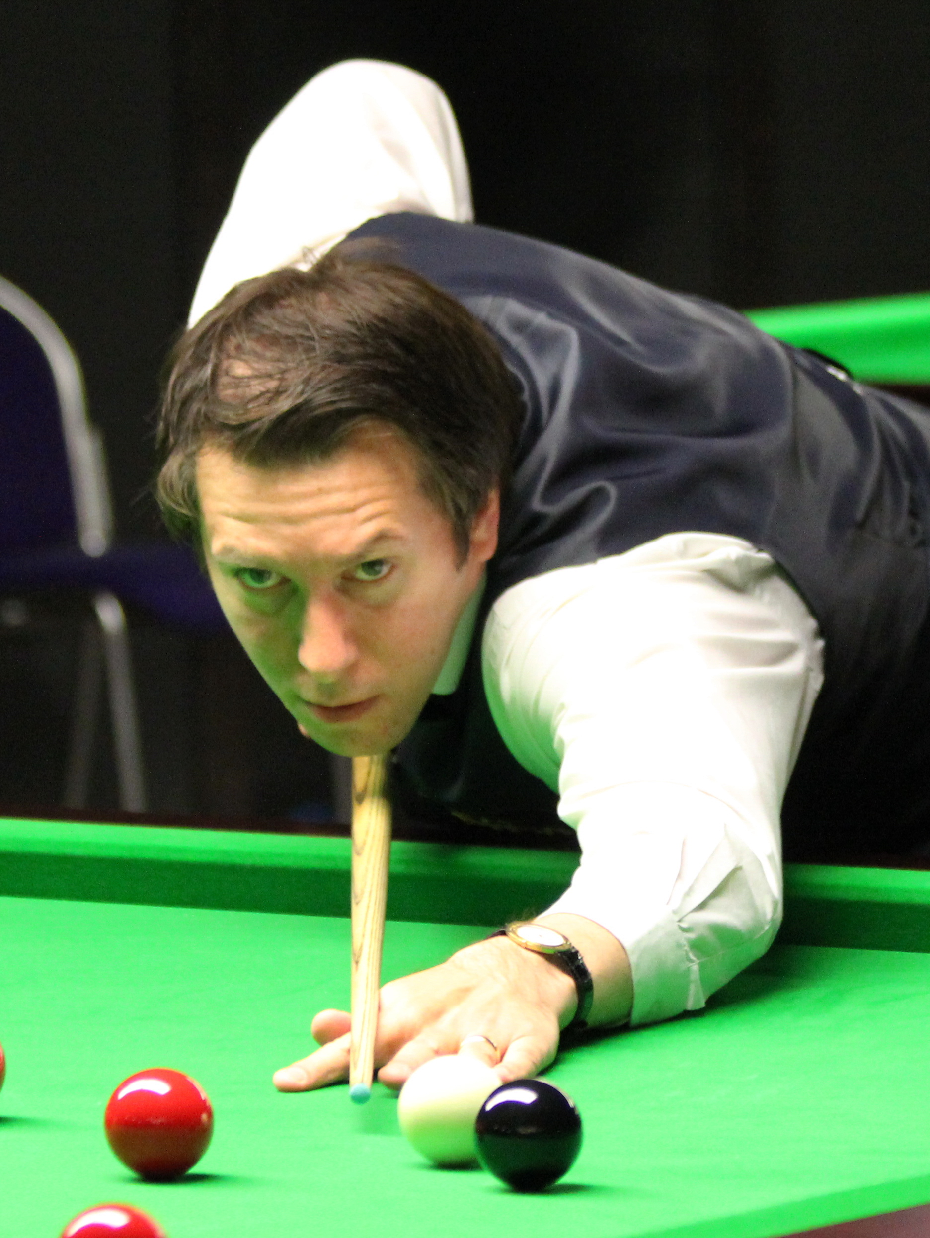 Dominic Dale beim Paul Hunter Classic 2012